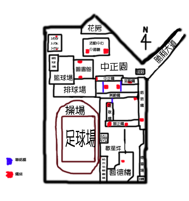 中正高中地圖。